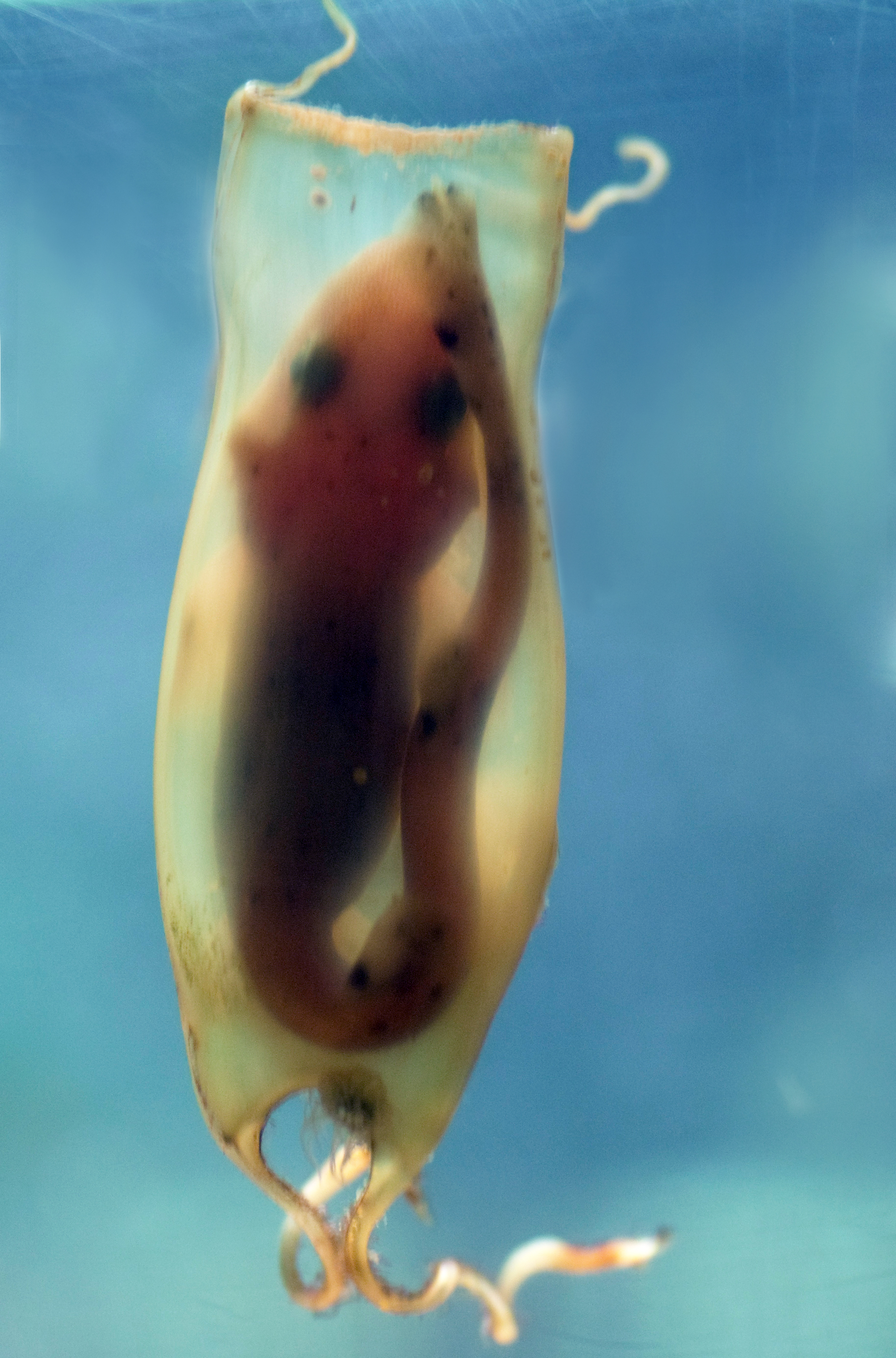 Eikapsel eines kleingefleckten Katzenhais (Scyliorhinus canicula)